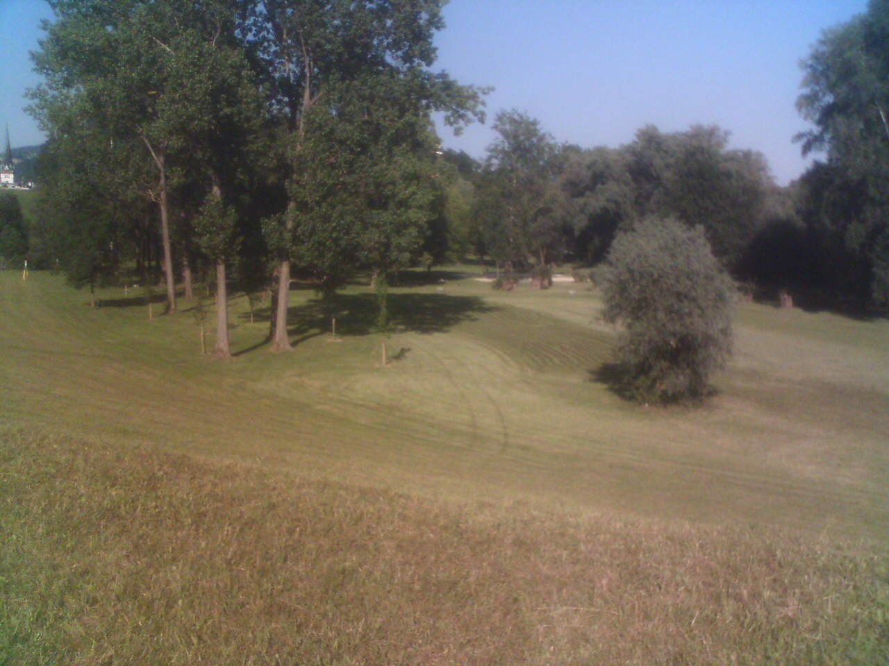 Fotografiert von mir Ende Juni 2005. Bild zeigt das Rodlgelände, ein Freizeitareal in Ottensheim. Links oben erkennt man den Kirchturm der Gemeinde. In der Mitte Rechts sind Beachvolleyballplätze vage zu erkennen. Davor, auf der gemähten Wiese, findet jährlich das Freiluftfestival OpenAir Ottensheim statt.